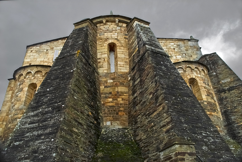 Templo originario del siglo VI,aunque reedificado entre los siglos X y XII,fué la primera catedral construída en el sur de Europa y constituye el único vestigio de un monasterio de gran importancia en la alta Edad Media gallega.Se trata de un edificio románico primitivo,de planta basilical de tres naves con crucero y tres ábsides semicirculares en la cabecera,con grandes contrafuertes añadidos posteriormente.Presente características del románico catalán,como las bandas lombardas y las grecas de ajedrezado que decoran los vanos. El rey Alfonso III estableció,en San Martiño de Mondoñedo (que recibió tal advocación en honor de los santos Martin de Tours y de Dumio,ambos originarios de Panonia-actual Hungría- y el último, apostol de los suevos)la nueva sede episcopal,siendo primer obispo Sabarico,al que sigueron otros catorce,entre ellos San Rosendo (925-948,luego retirado al monasterio que fundó en Celanova-Ourense),Gonzalo (1070-1108,sepultado en esta iglesia cuya terminación impulsó) y Nuño Alonso (1112-1136,uno de los autores de la magnifia Historia Compostelana).En el siglo XII,el oriente del Obispado-Provincia de Britonia(denominación con que se conocía toda la comarca que va de Ferrol hasta el rio Navia) fué cedido al de Oviedo,y en 1112,la reina Urraca traslada definitivamente la sede episcopal a Vlibría o Villamayor de Val de Brea,redenominada Mondoñedo en honor de la antigua catedral.Aún existe un dialecto Mindoniense como recuerdo de los antiguos repobladores de estas tierras.